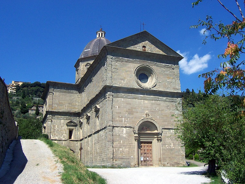 Cortona - Chiesa della Madonna del Calcinaio